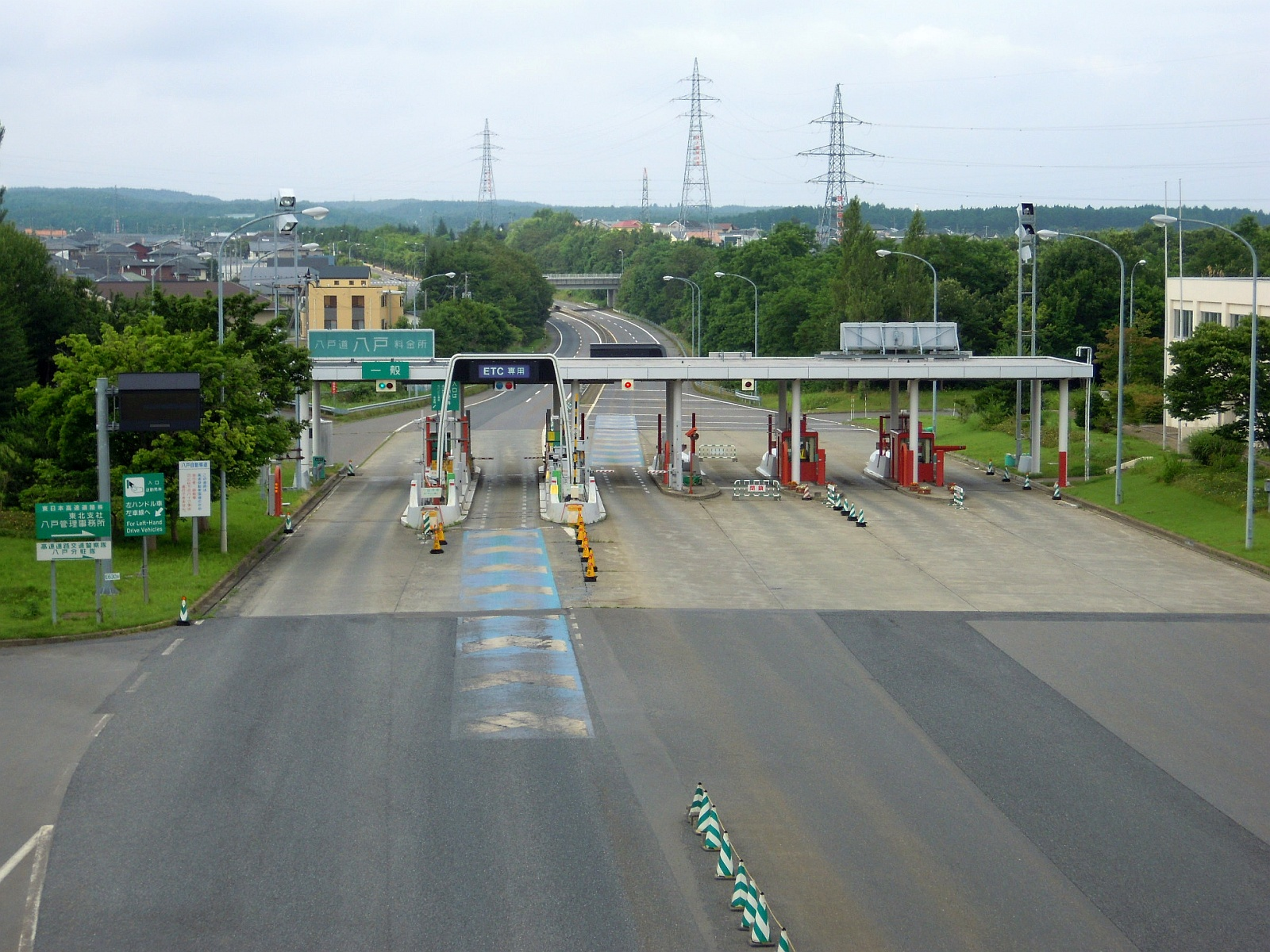 青森県八戸市にある八戸自動車道八戸インターチェンジ料金所。